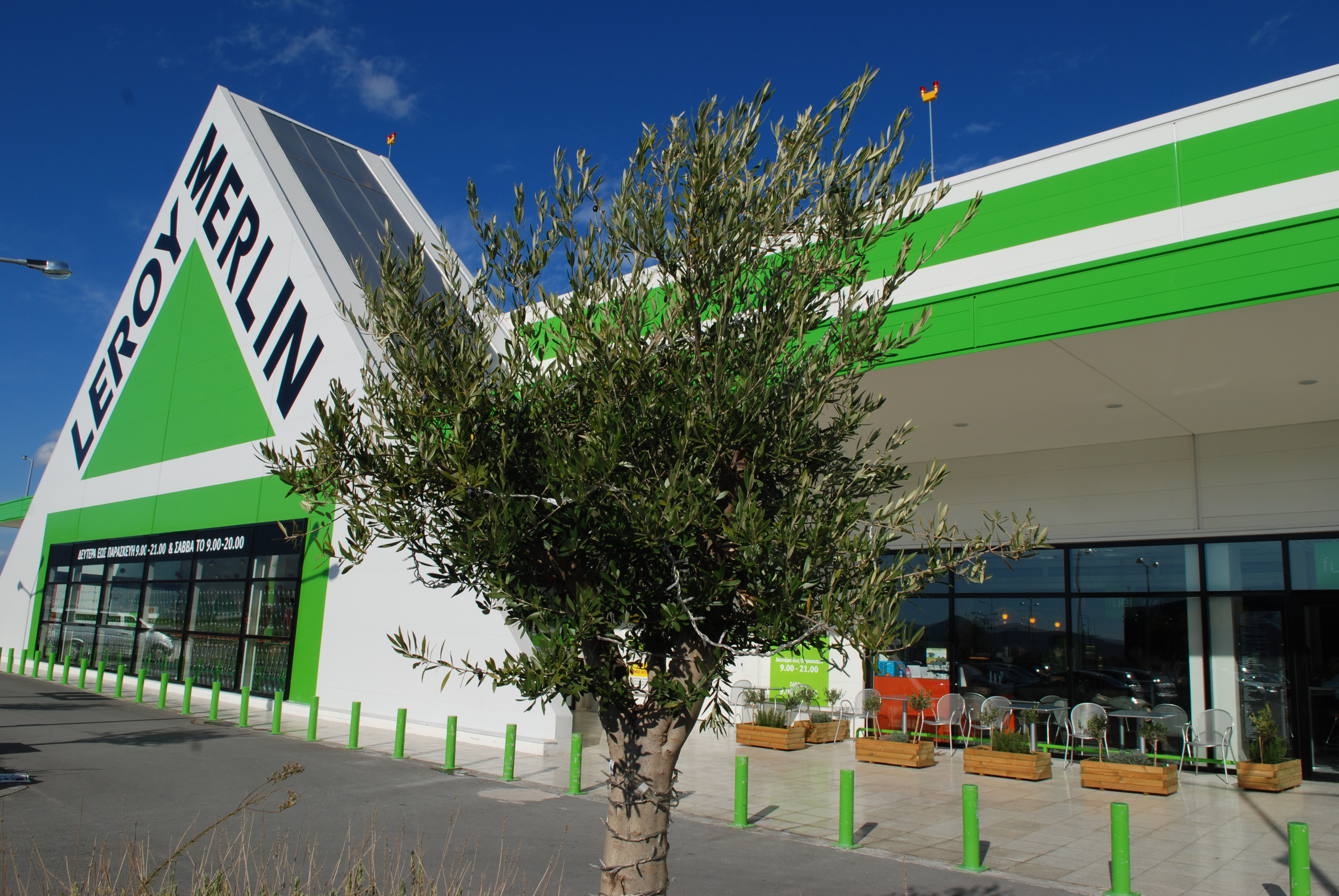 Un magasin Leroy Merlin en Grèce, premier magasin de la marque ouvert en Grèce a côté de l'aéroport Eleftherios Venizelos.